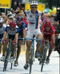 Museeuw gagne la Hew classics en 2002